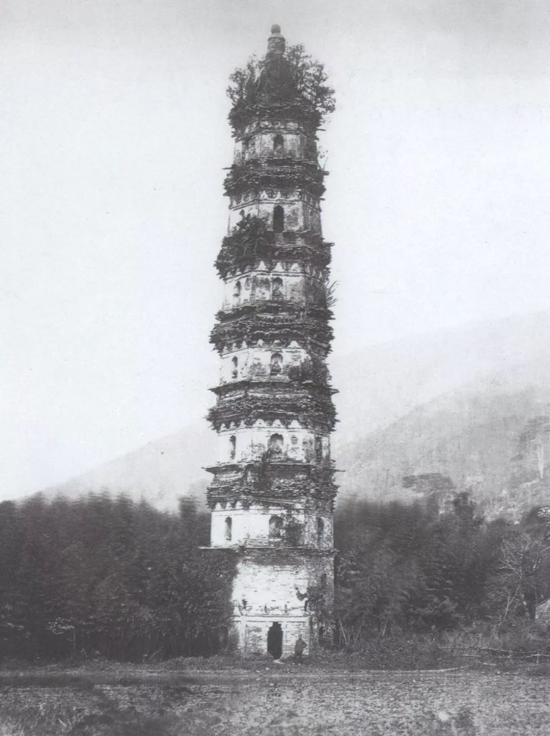 19世纪60年代阿育王寺西塔